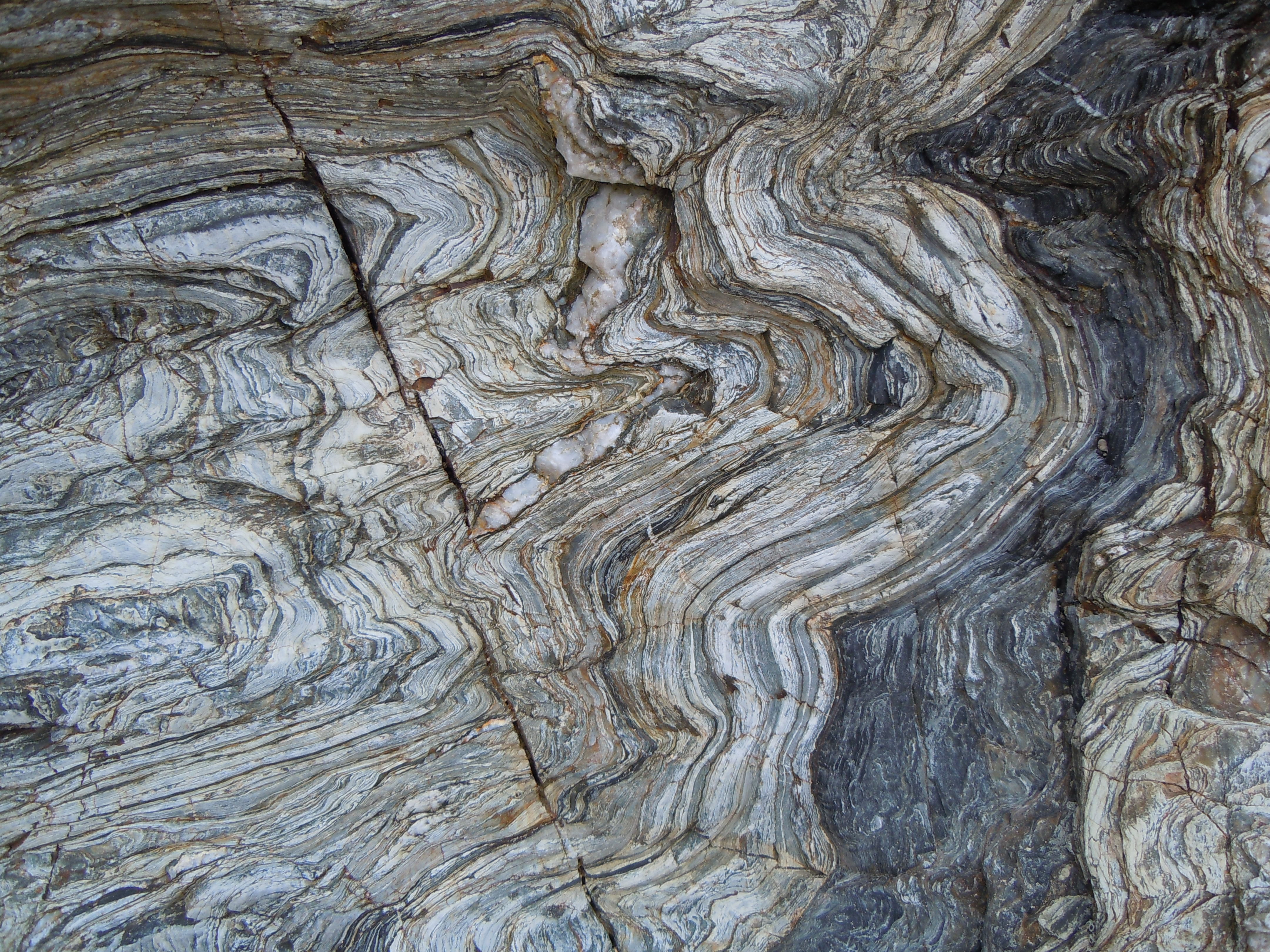 Plis alternés Tuf volcanique et de quartzite graphitique à Bordardoué, Le Palais